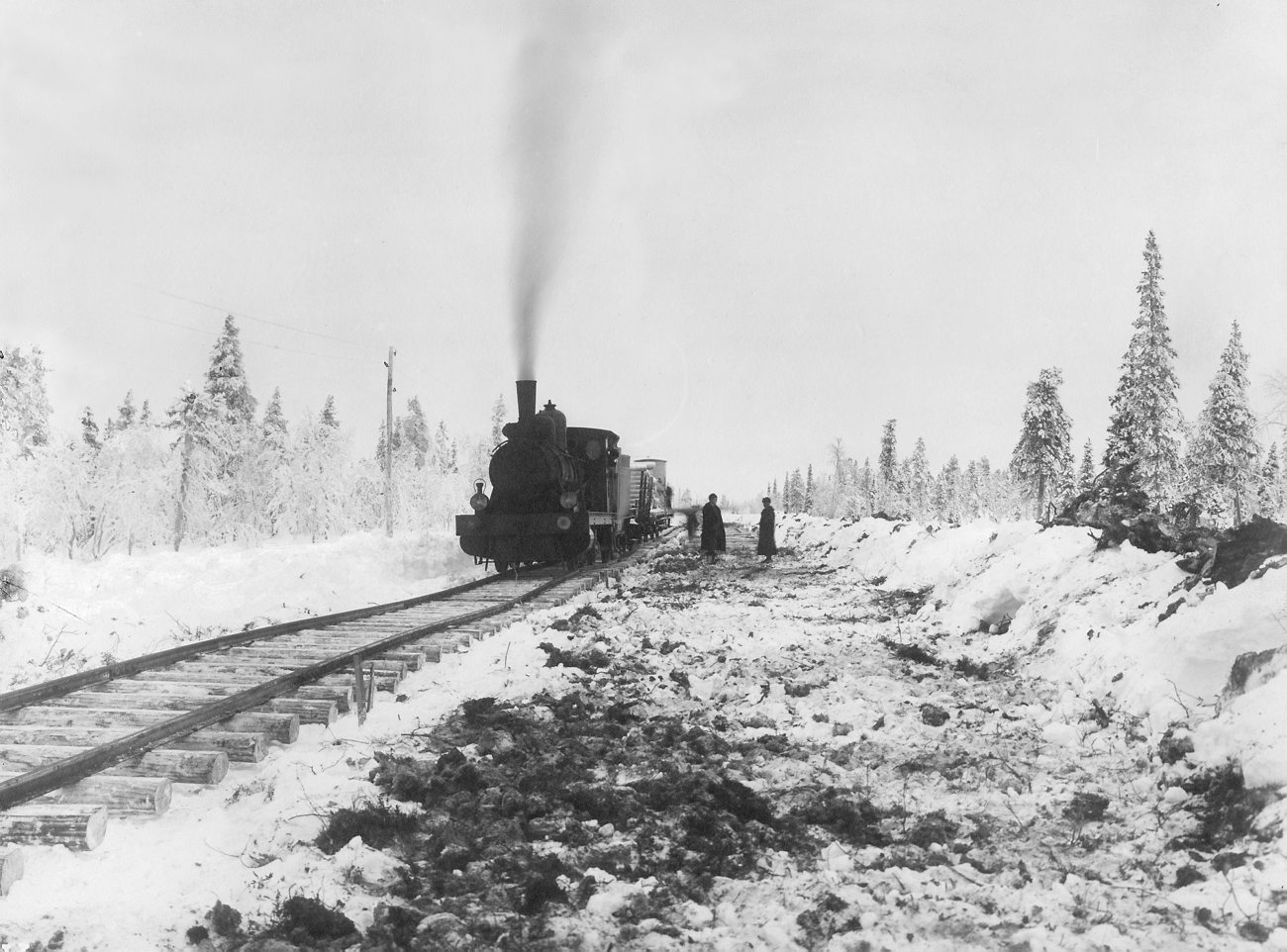 DIG3015. Porjus Kraftverk. Materialtåg på det nyss utlagda spåret. Fotografiet är skänkt till Tekniska museet från Svenska Turistföreningen.